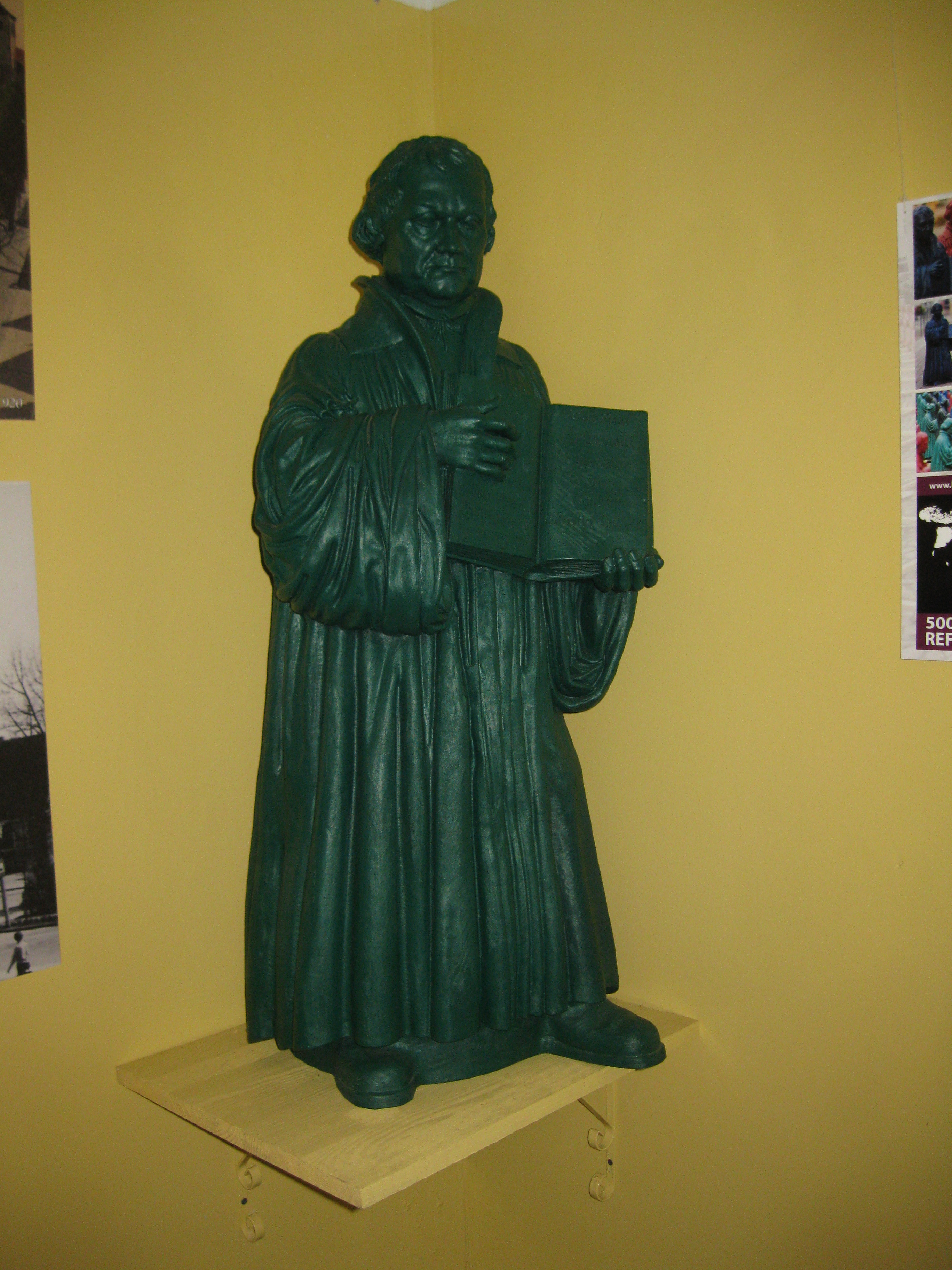 Giżycko - zespół kościoła ewangelickiego: kościół (zabytek nr A-3244 i 1827 z 18.12.1991)